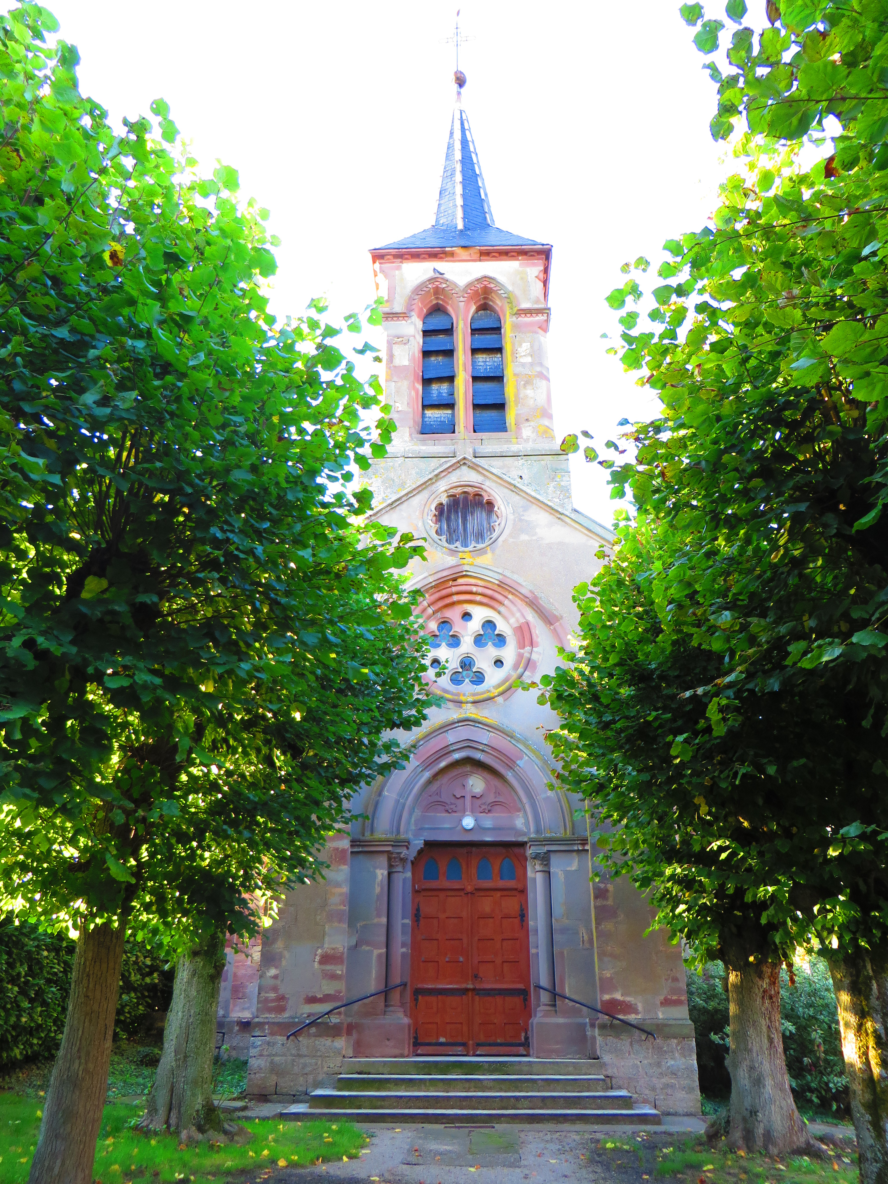 Zommange l'église Saint-Laurent